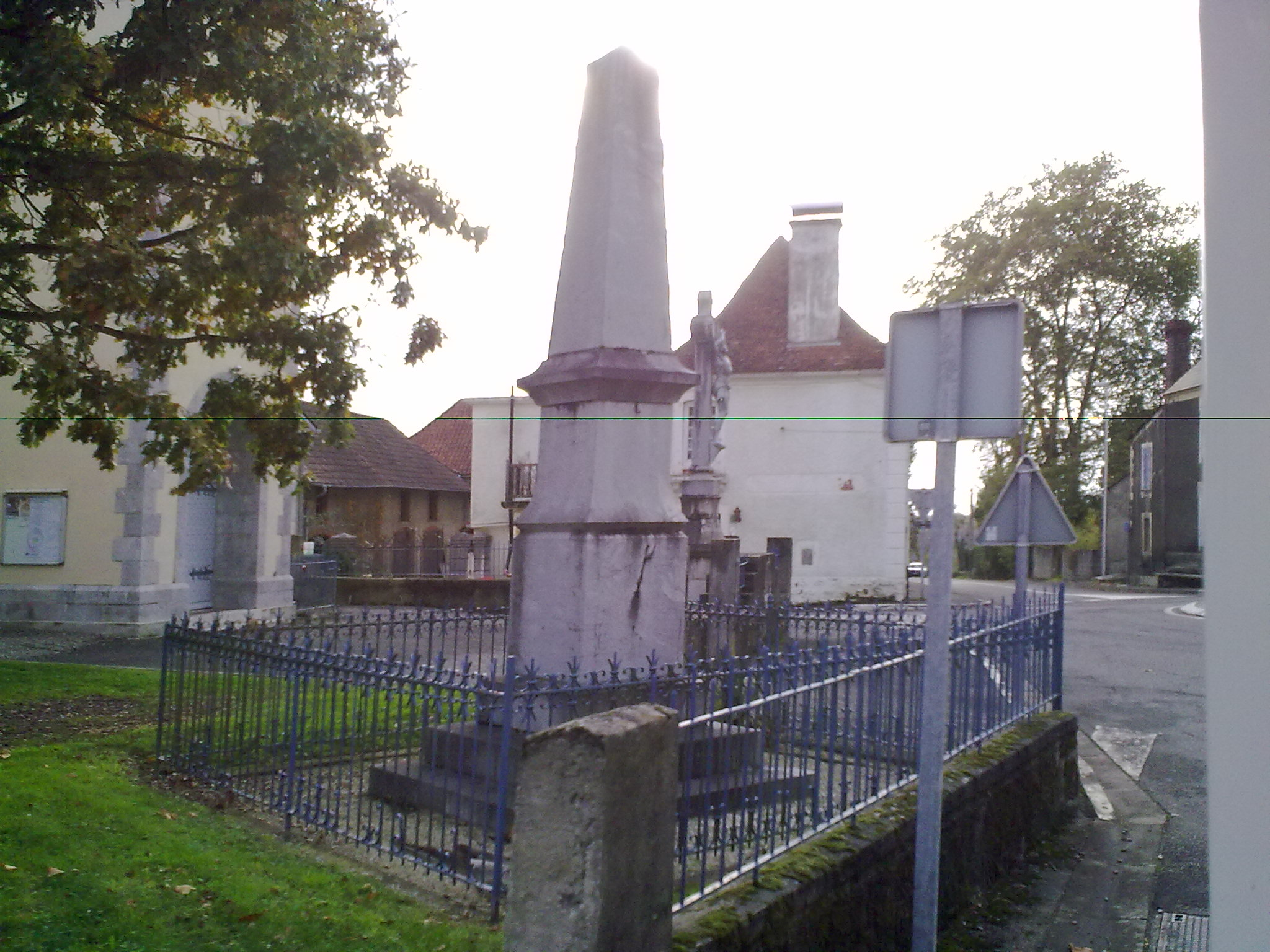 Cescau (Pyrénées-Atlantiques)